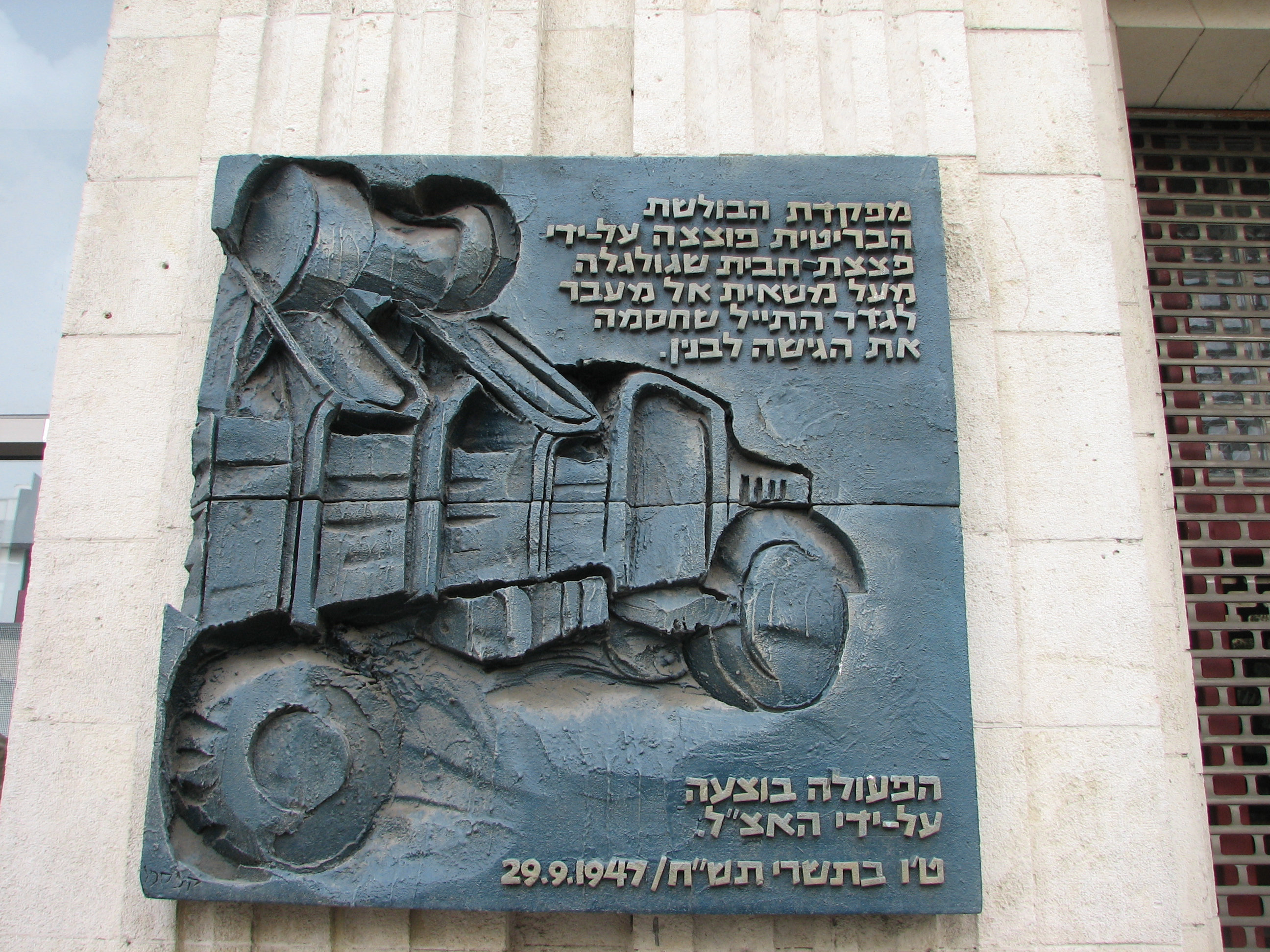 Khiat Buildings, downtown Haifa בתי ח'יאט - הם מכלול של חמישה מבני מסחר בעיר התחתית בחיפה, שוכנים בין דרך יפו ודרך העצמאות המבנה בדרך העצמאות 84 שימש כמשרד של הבולשת הביטית. שלט הנצחה לפצצה שגלגל האצ"ל על המבנה ביום 29 בספטמבר 1947